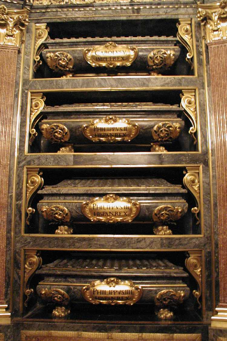 Sepulcros de varios reyes en el Panteón de Reyes del monasterio de San Lorenzo de El Escorial, (España). Comenzando por la parte superior, contienen los restos de los siguientes monarcas: Carlos I de España (1500-1558), rey de España, emperador del Sacro Imperio Romano Germánico e hijo de Felipe el Hermoso y de Juana I de Castilla. Felipe II de España (1527-1598), rey de España e hijo del anterior y de Isabel de Portugal. Felipe III de España (1578-1621), rey de España e hijo del anterior y de la reina Ana de Austria Felipe IV de España (1605-1665), rey de España e hijo del anterior y de Margarita de Austria-Estiria.